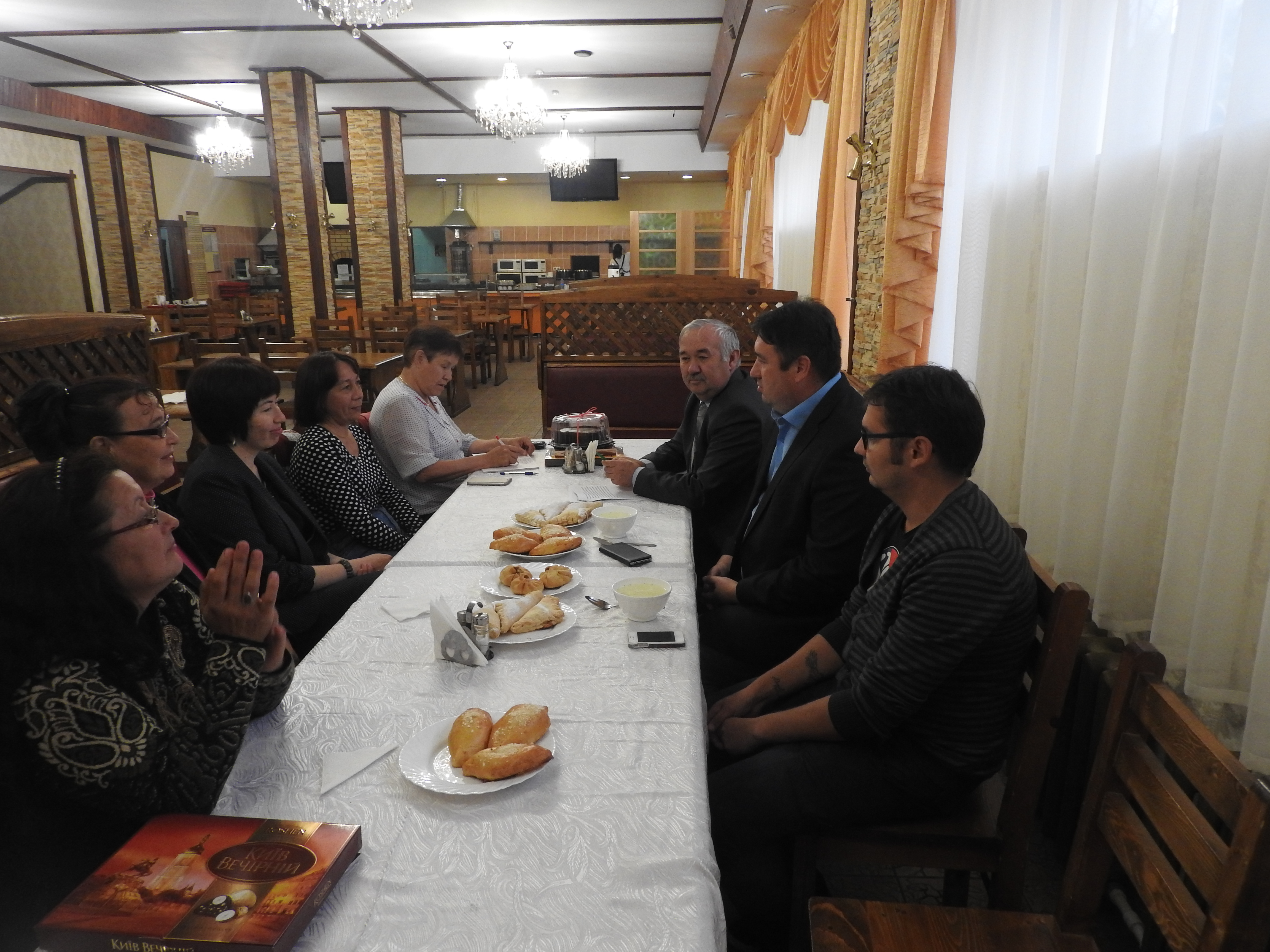 Башҡортса: Сираттағы викиосрашыу